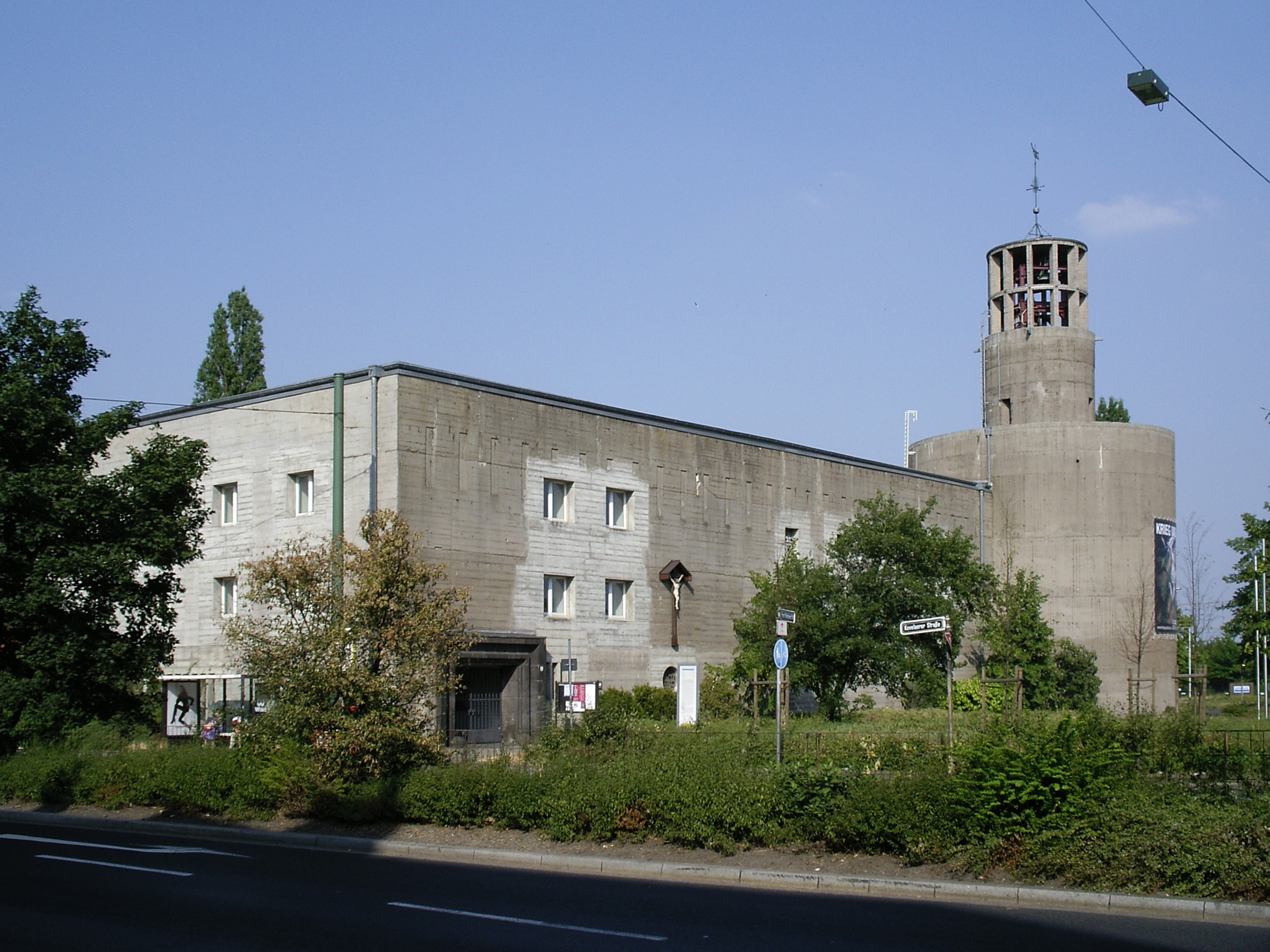 Düsseldorf-Heerdt - Bunkerkirche am Handweiser - Gesamtansicht